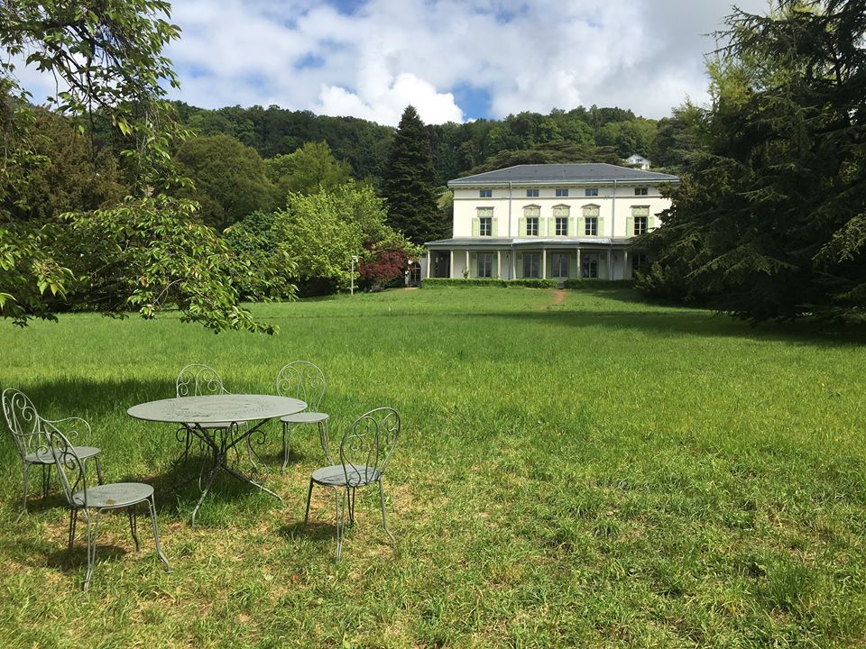 Photo du Manoir de Ban par Chaplin's World